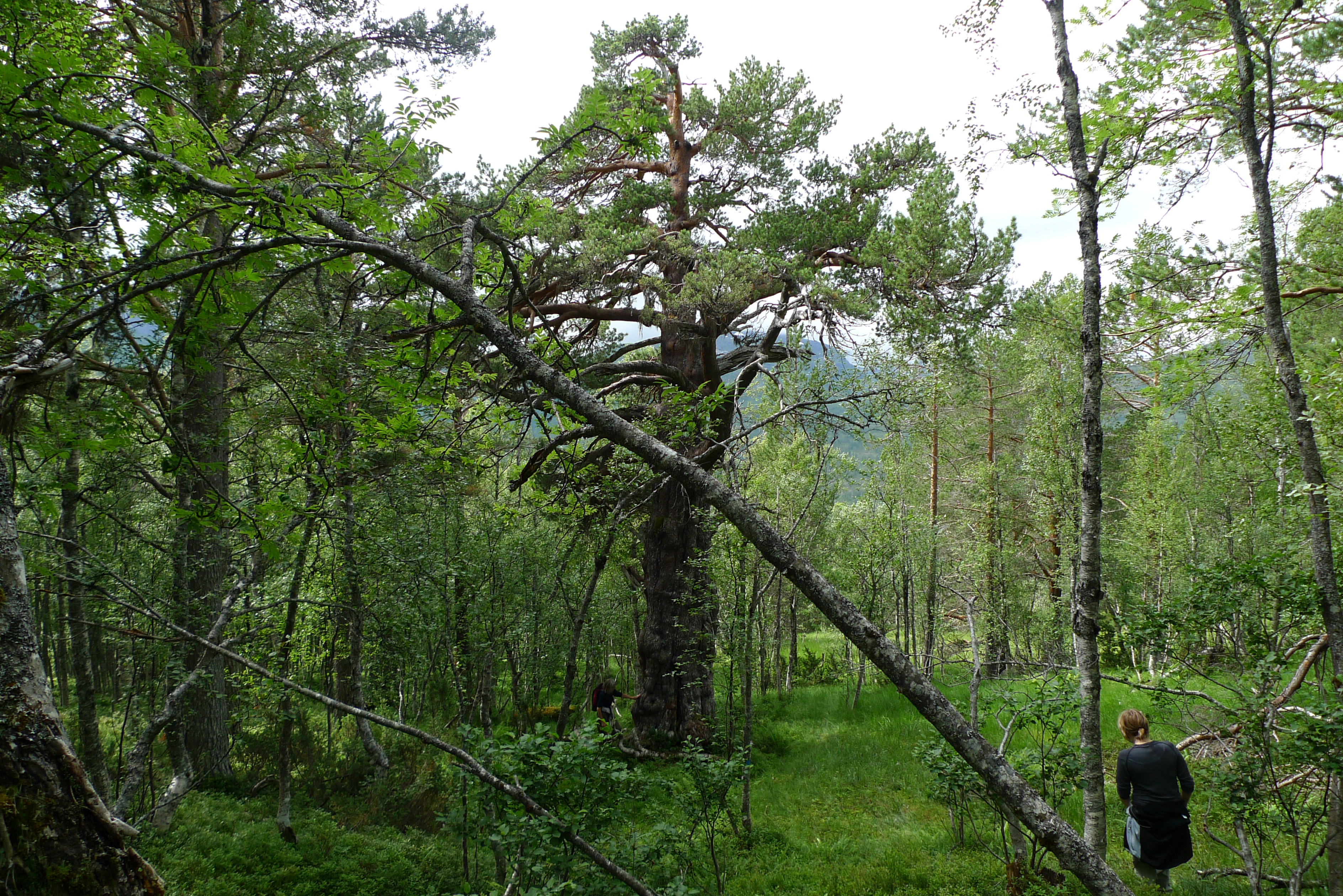 Furutreet Breiskartolla i Vindøldalen, Surnadal kommune.